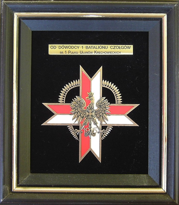 Znak 1 batalionu czołgów z 4 BKPanc - Orzysz